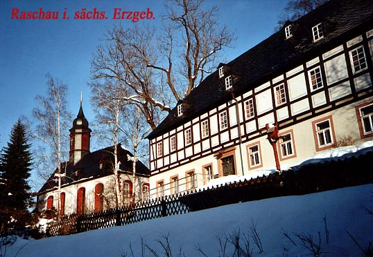 Kirche und Pfarrhaus in Raschau